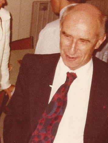 Jean-Marie Pérès à la Station Marine d'Endoume lors d'une soutenance de thèse